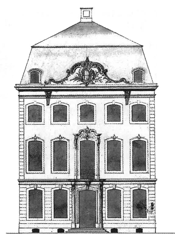 Entwurf Johann Joseph Couvens für ein Bürgerhaus in Ecklage